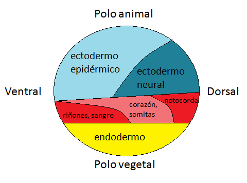 Mapa de destino celular de un anfibio, esquema sin detalle a nivel celular